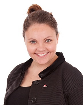 Anna Wallén, riksdagsledamot för Västmanlands län,fotograf Per Helgoson